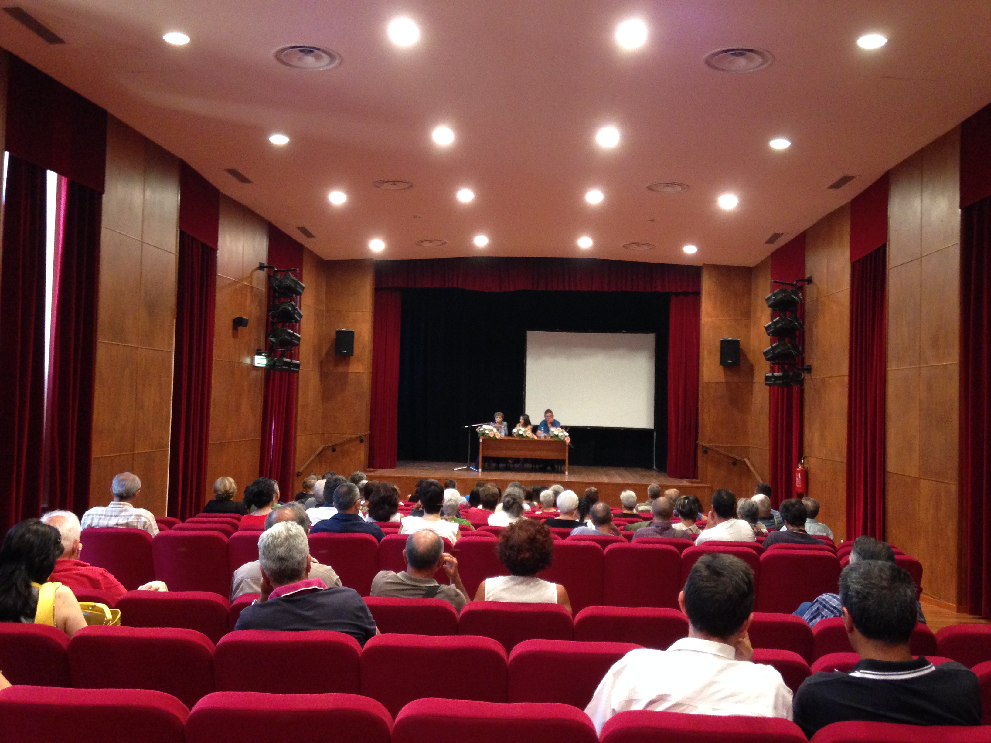 Sala teatro di recente realizzazione utilizzata per convegni e concerti